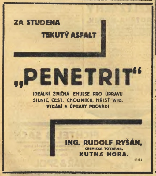 Penetrit, dobová inzerce. Text: ZA STUDENA TEKUTÝ ASFALT "PENETRIT" IDEÁLNÍ ŽIVIČNÁ EMULSE PRO ÚPRAVU SILNIC, CEST, CHODNÍKŮ, HŘIŠŤ ATD. VYRÁBÍ A ÚPRAVY PROVÁDÍ ING. RUDOLF RYŠÁN CHEMICKÁ TOVÁRNA KUTNÁ HORA